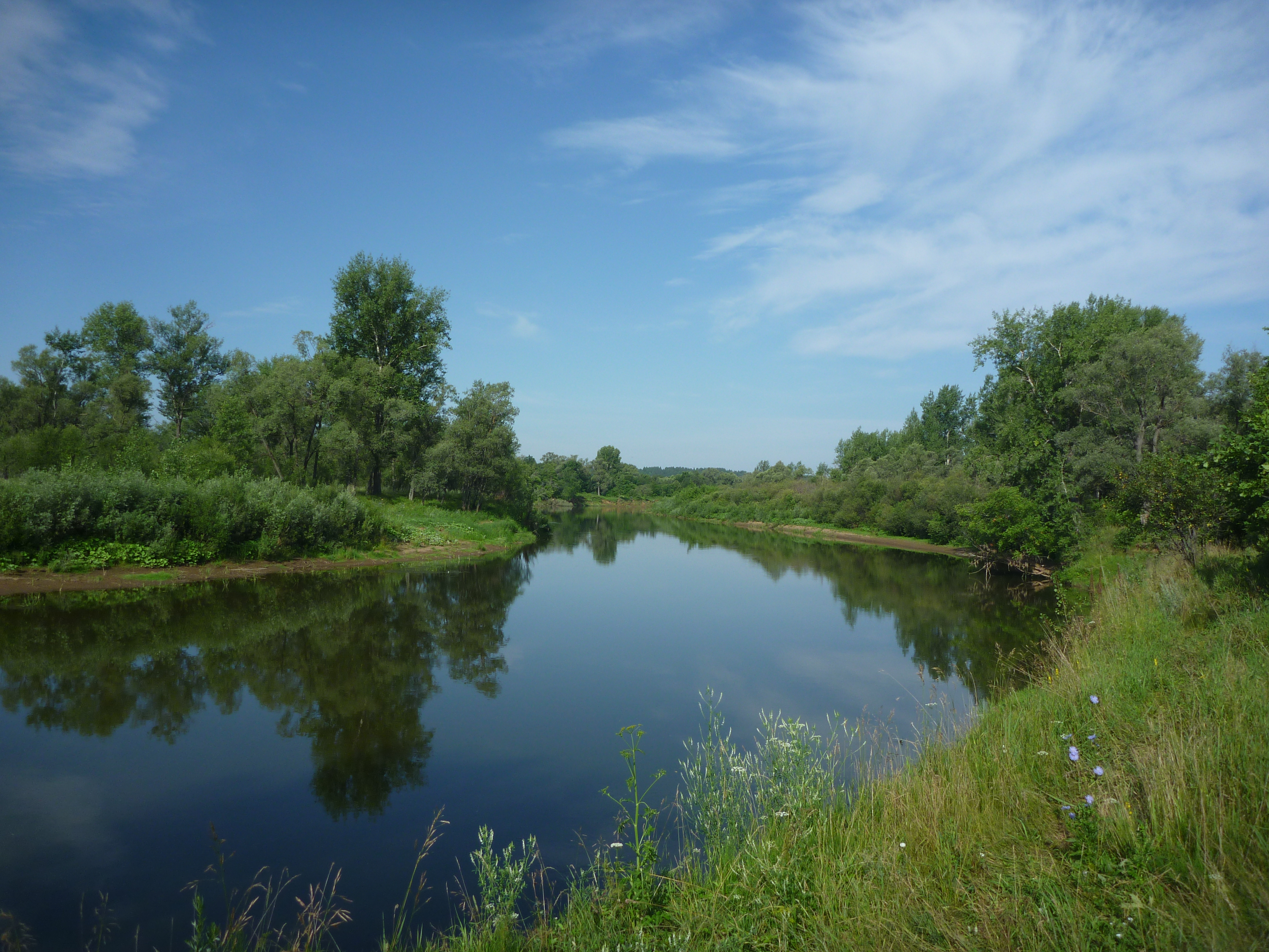 Изгиб Сивы